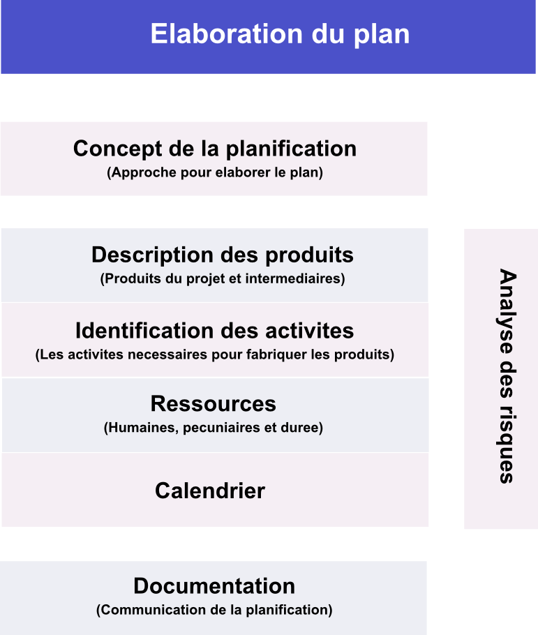 Diagramme expliquant les etapes de planification dans PRINCE2.